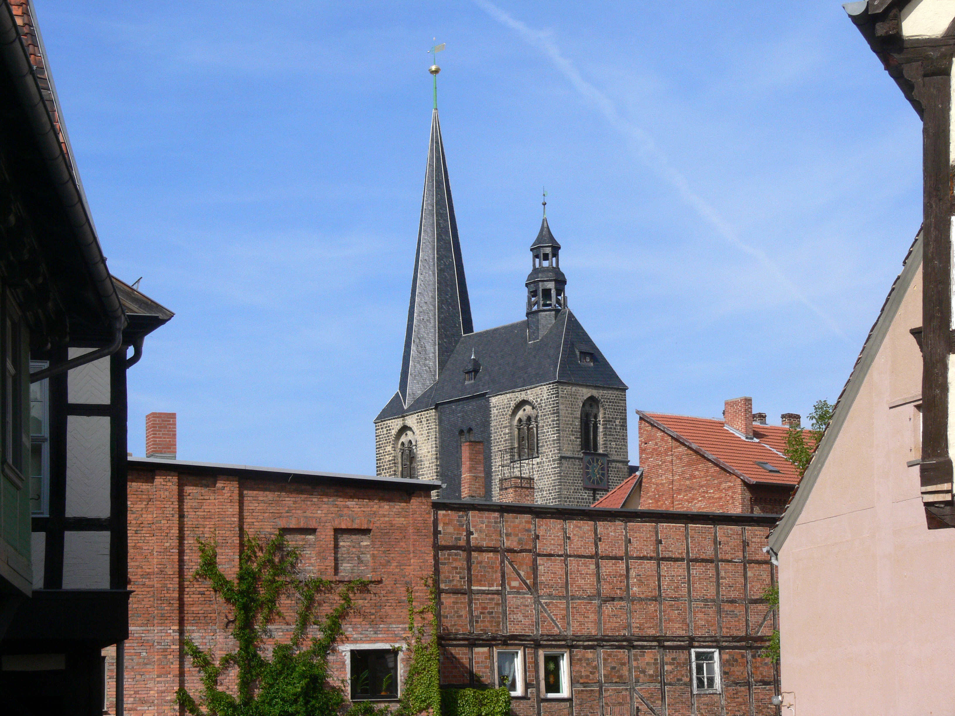 Blick auf die Benedikti—Kirche.